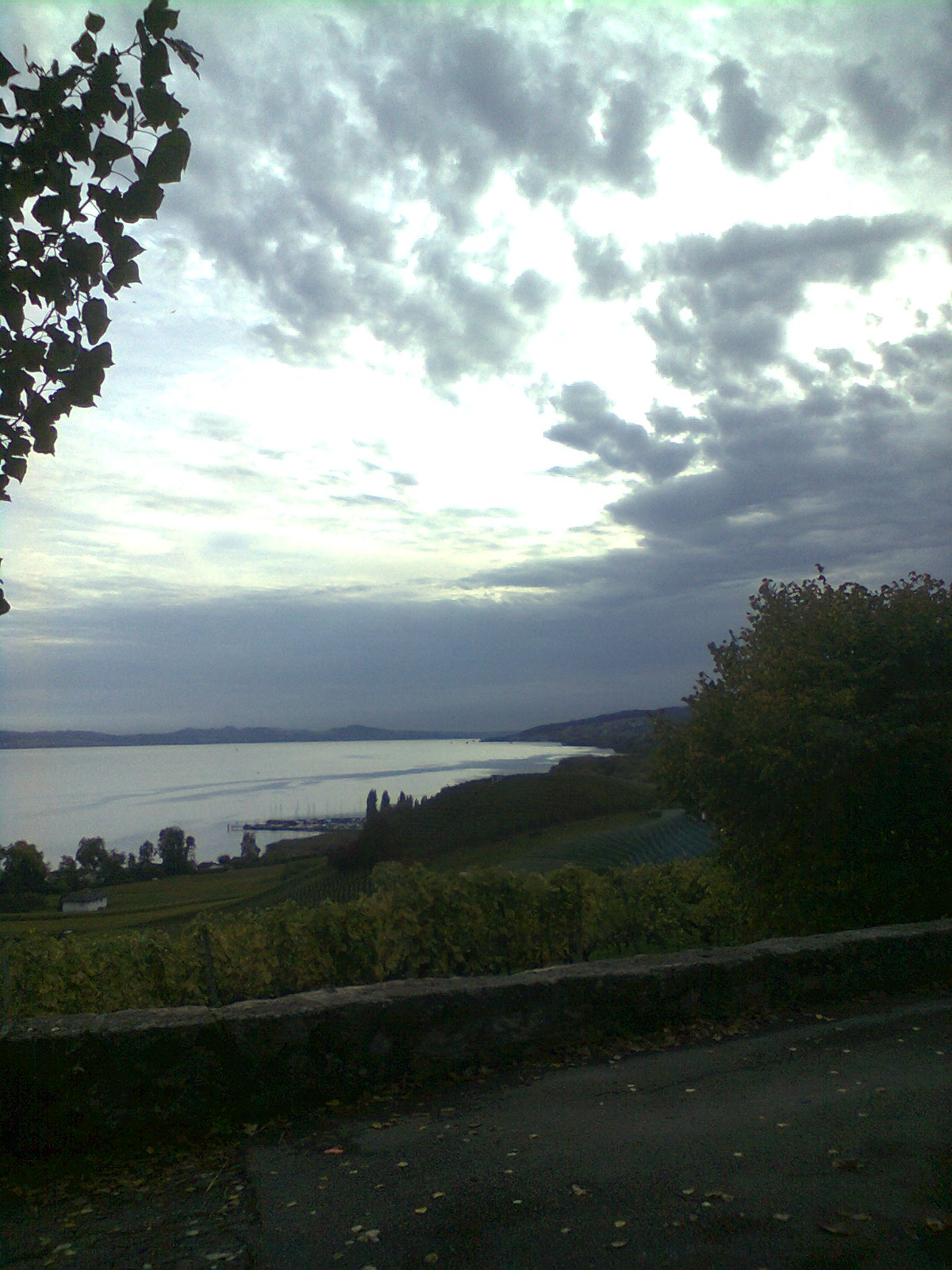 Point du grains